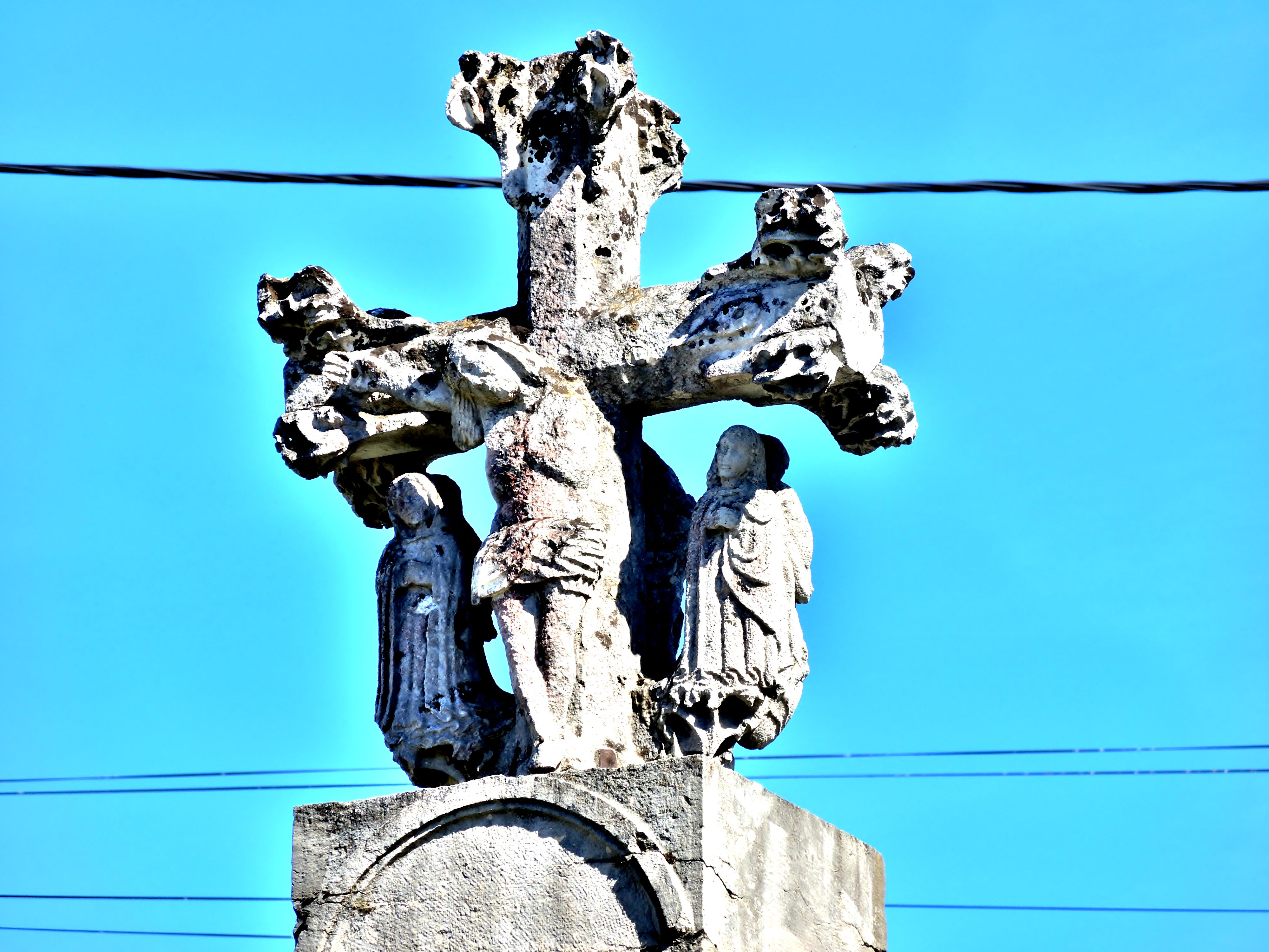 Calvaire sur le toit de la source de la grande fontaine-lavoir circulaire. Germéfontaine. Doubs